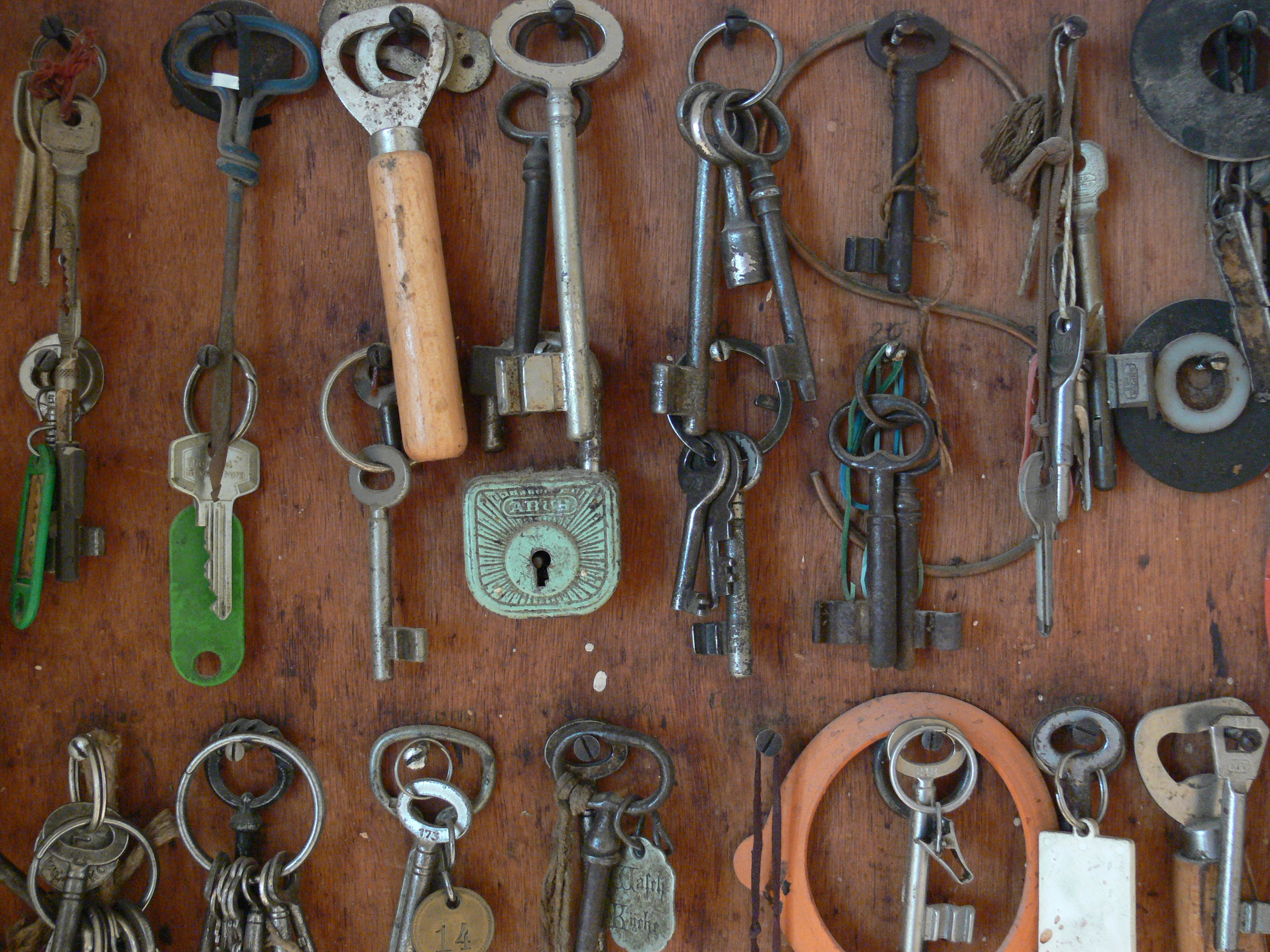 Museum Humpisquartier, Ravensburg Schlüsselbrett der bis in die 1980er Jahre im Humpisquartier betriebenen Pension Hindelang, 20. Jh., Schenkung Siegfried Hindelang (Böblingen) Humpis-Quartier Native nameMuseum Humpis-QuartierLocationRavensburg, GermanyCoordinates47° 46′ 49.8″ N, 9° 36′ 57.24″ E Established2009Web page control : Q1637298 VIAF: 128828875 LCCN: nb2007020847 GND: 4565586-8 WorldCat institution QS:P195,Q1637298